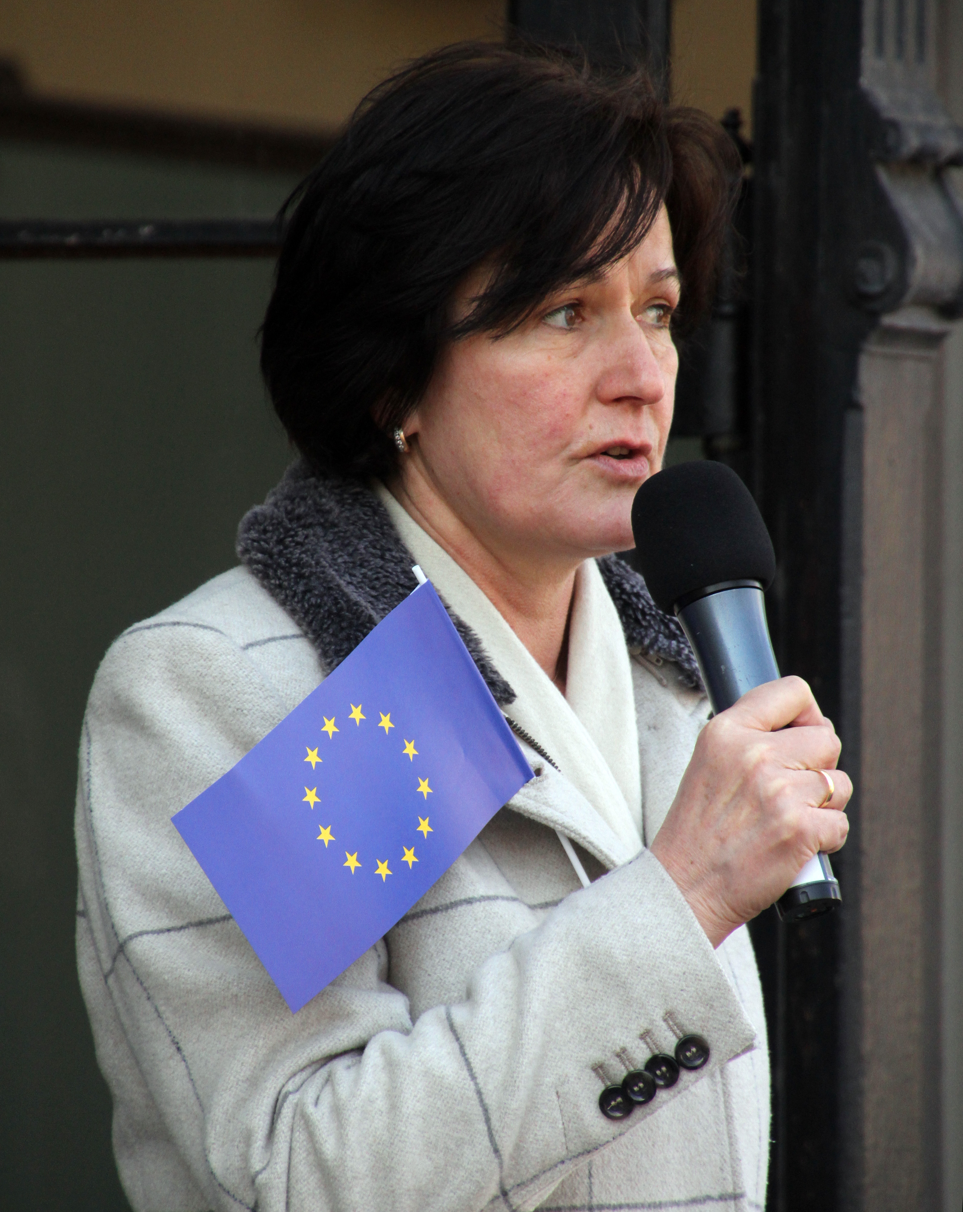 Baden-Badens OB Margret Mergen spricht bei der Kundgebung anlässlich 60 Jahre Römische Verträge vor dem Festspielhaus am 23. März 2017.